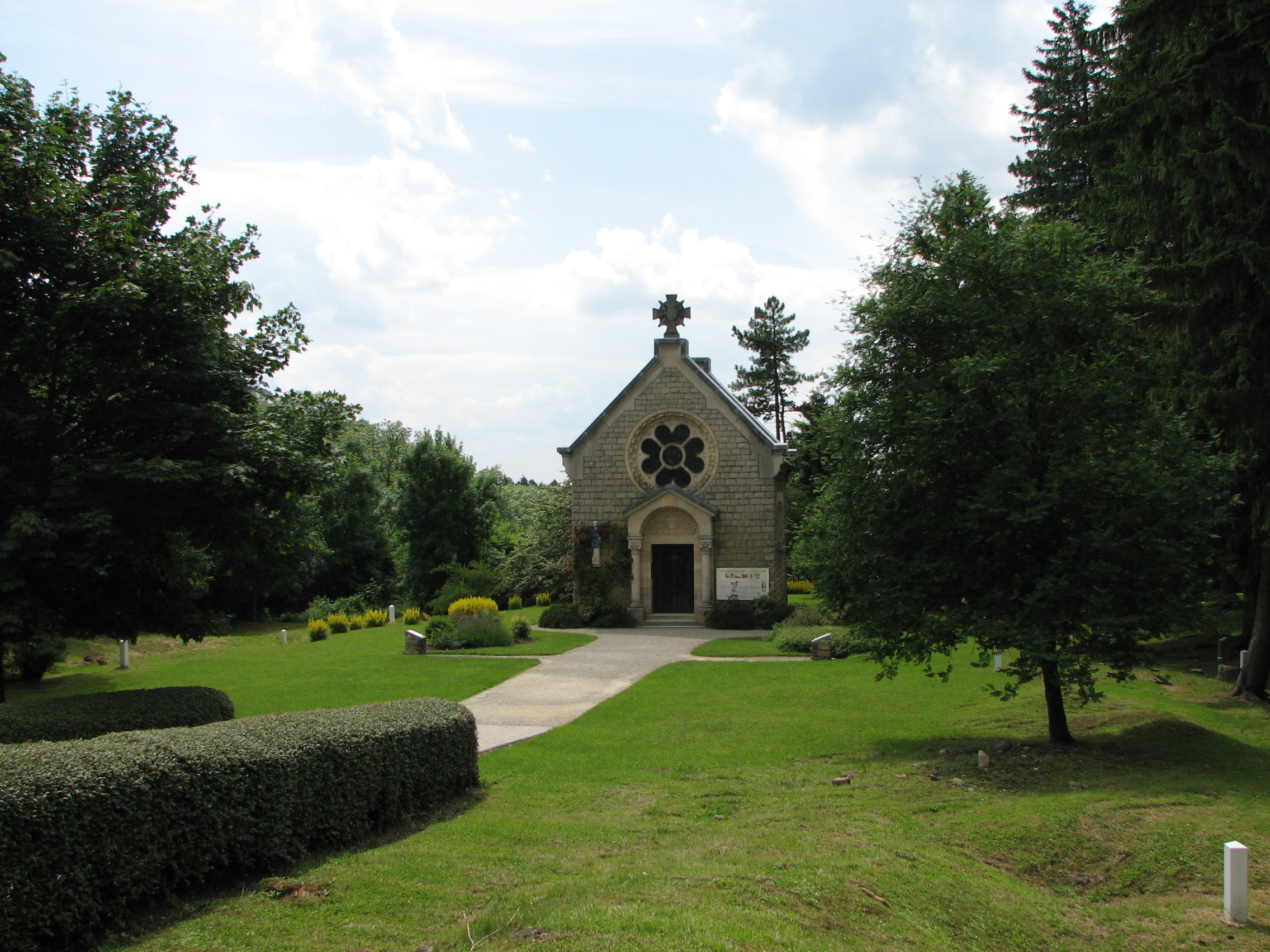 Notre-Dame de l'Europe, église construite après la guerre sur l'emplacement de l'ancienne église du village détruit de Fleury-devant-Douaumont.